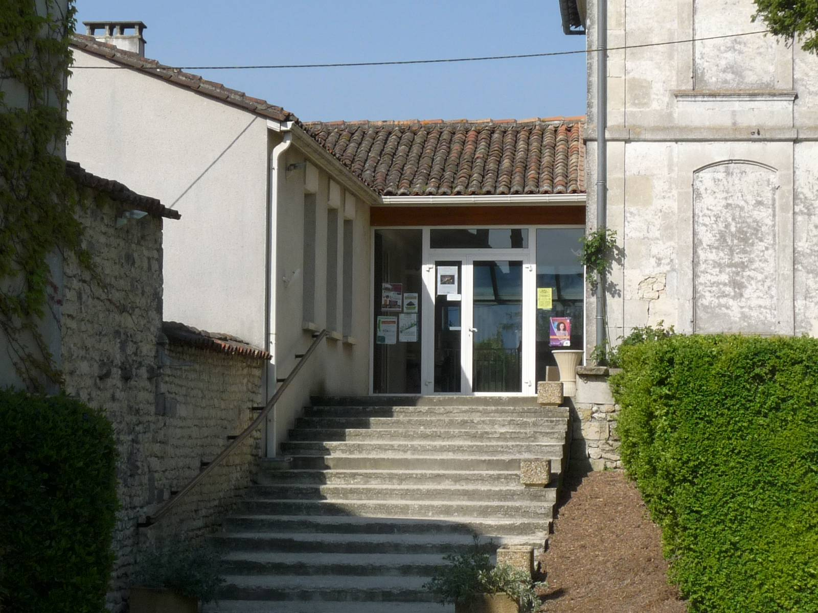 mairie de Salles-d'Angles, Charente, France